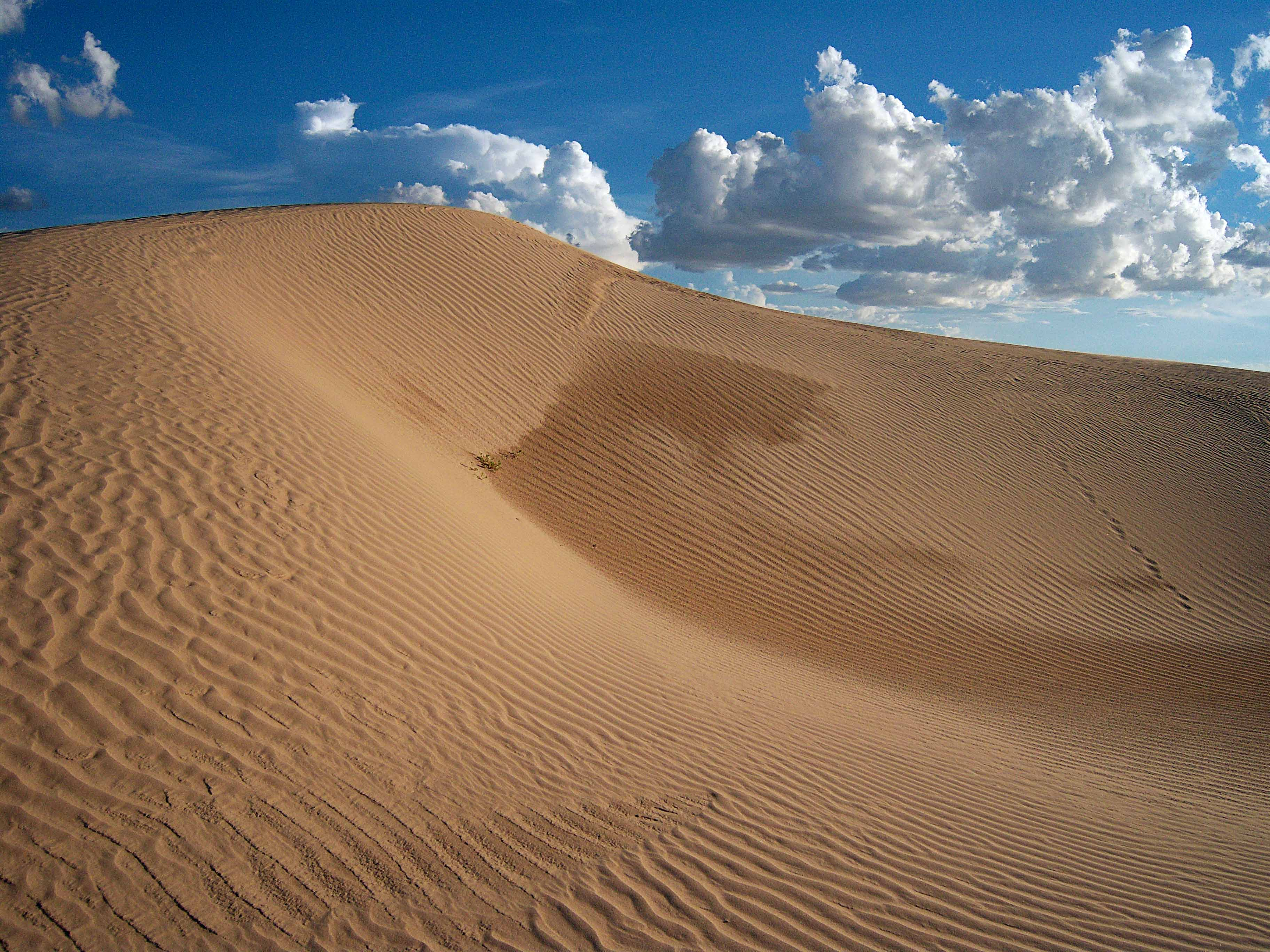 Dunas de Samalayuca, en el desierto de Chihuahua, México. Samalayuca se encuentra ubicado al sur de Ciudad Juarez.